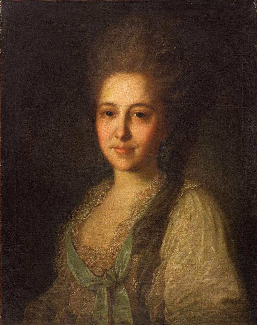 Екатерина Ивановна Козицкая, ур. Мясникова (1746—1833)